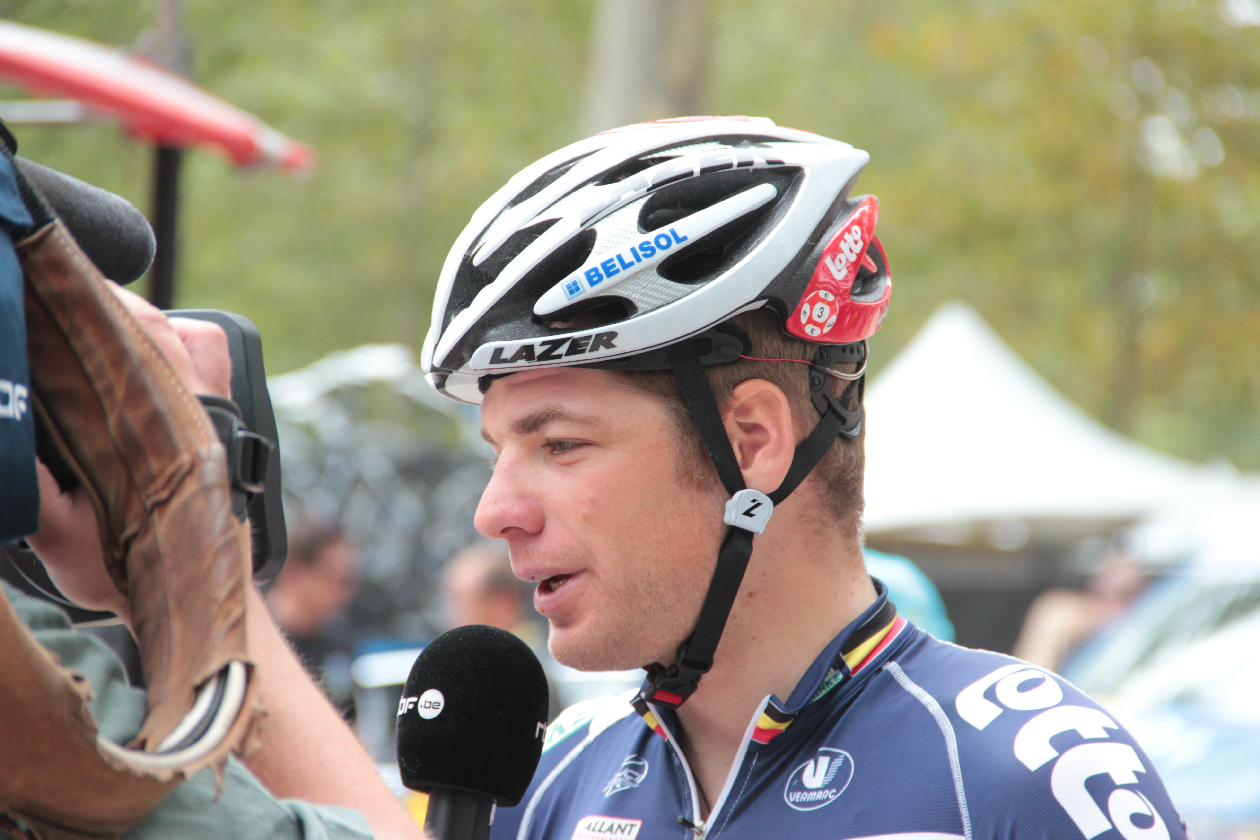 Jürgen Roelandts interviewé par la RTBF avant le départ de la 18e étape du Tour de France 2012.